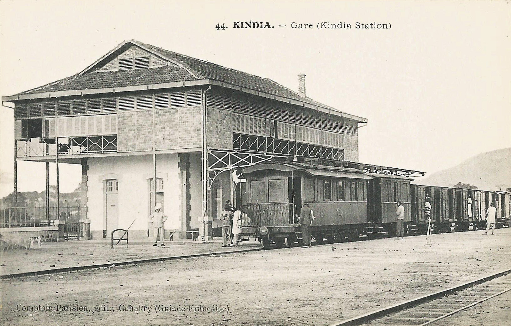 44. Guinée Française. Kindia. Gare.